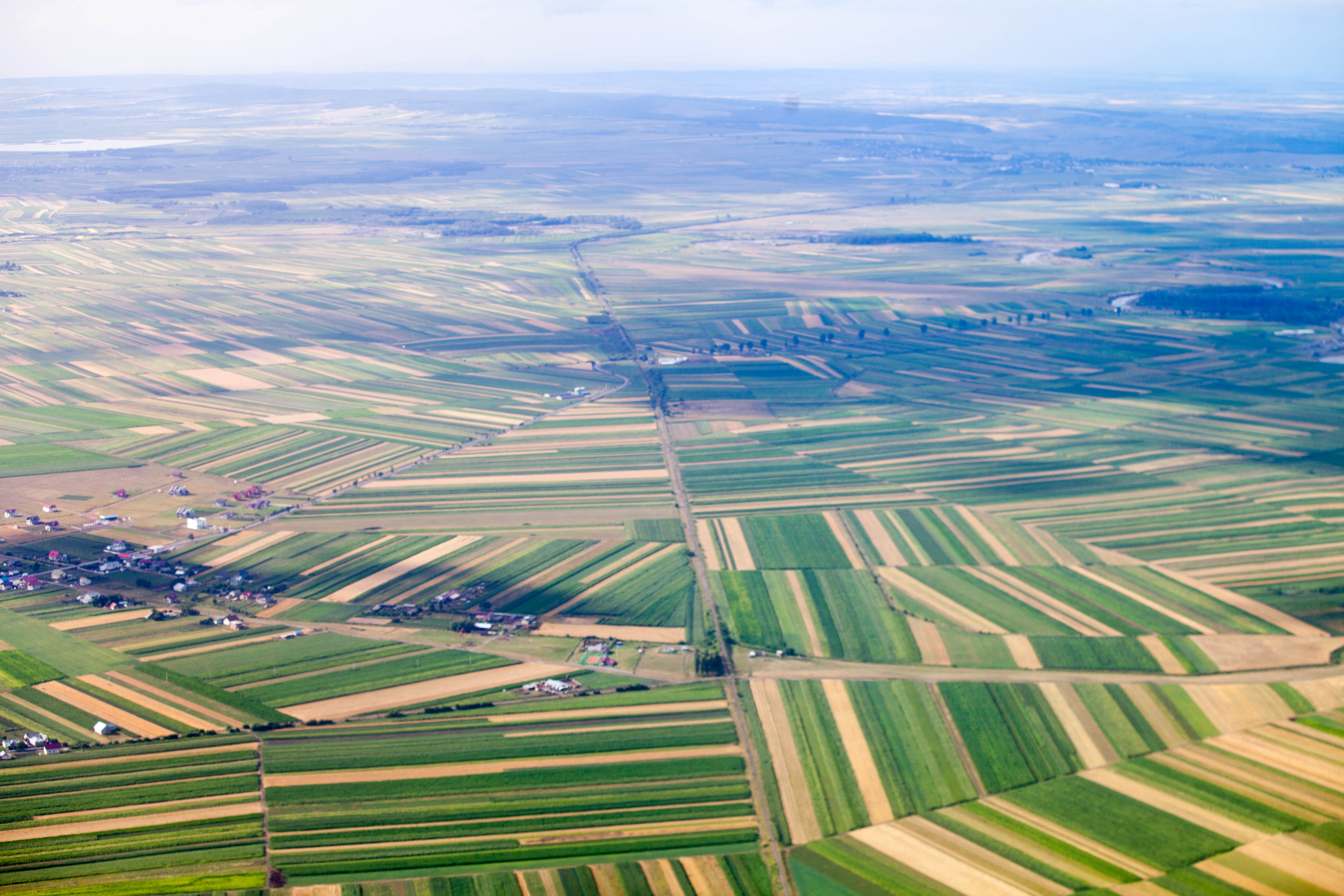 Around Suceava, Romania